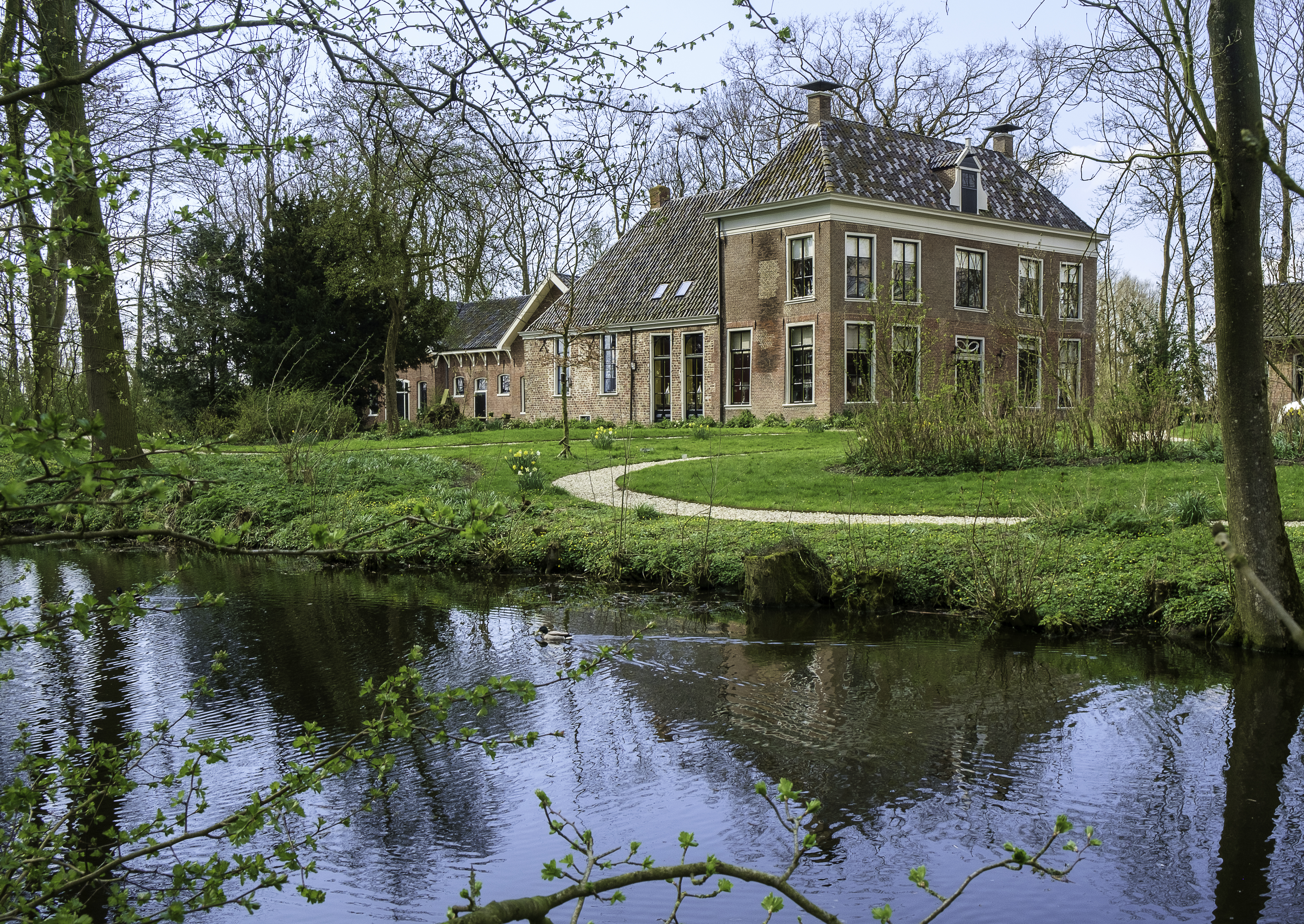 Allersmaborg